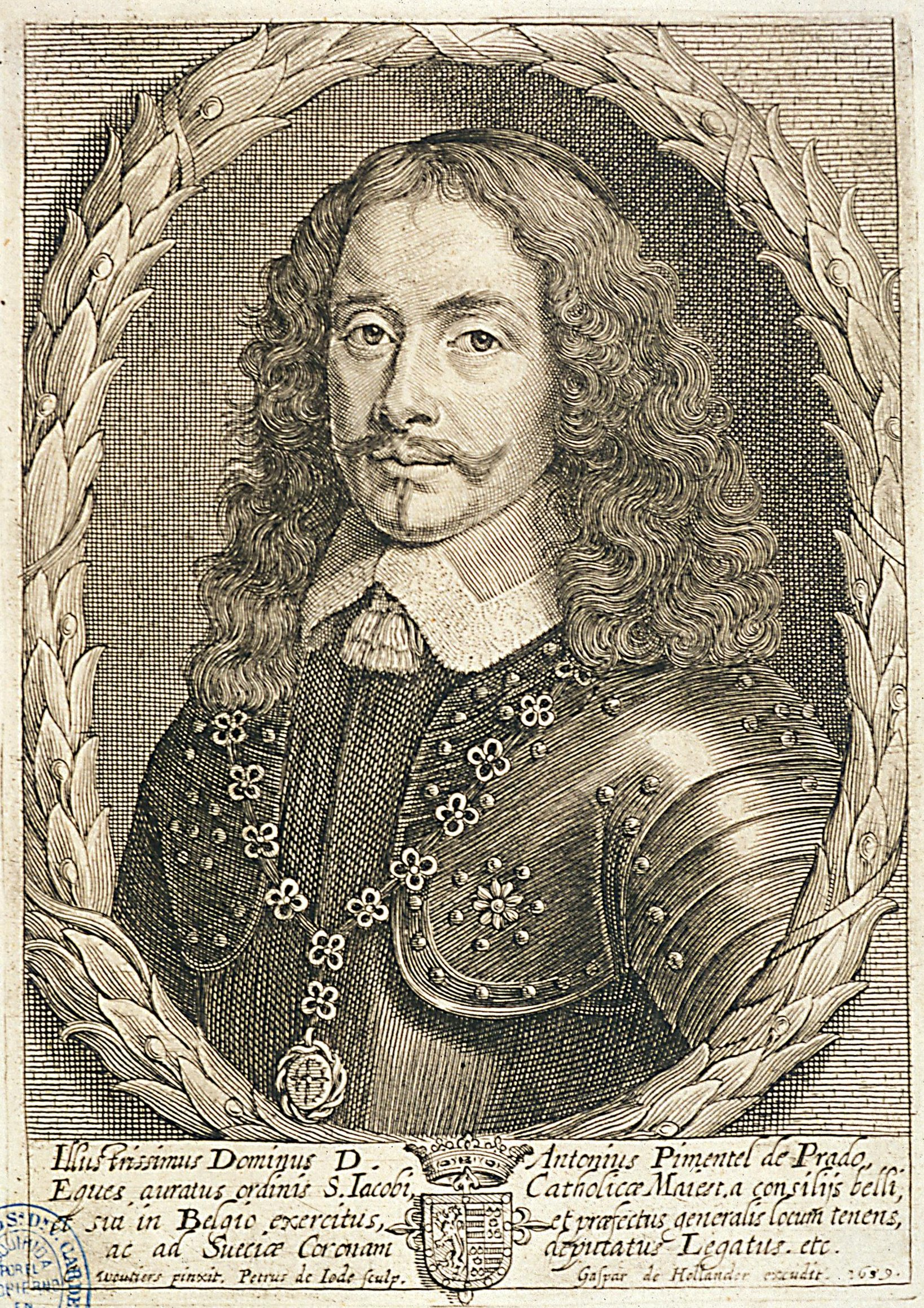 Antonio Pimentel de Prado (1604-c.1671), caballero de Santiago y embajador en Suecia y París